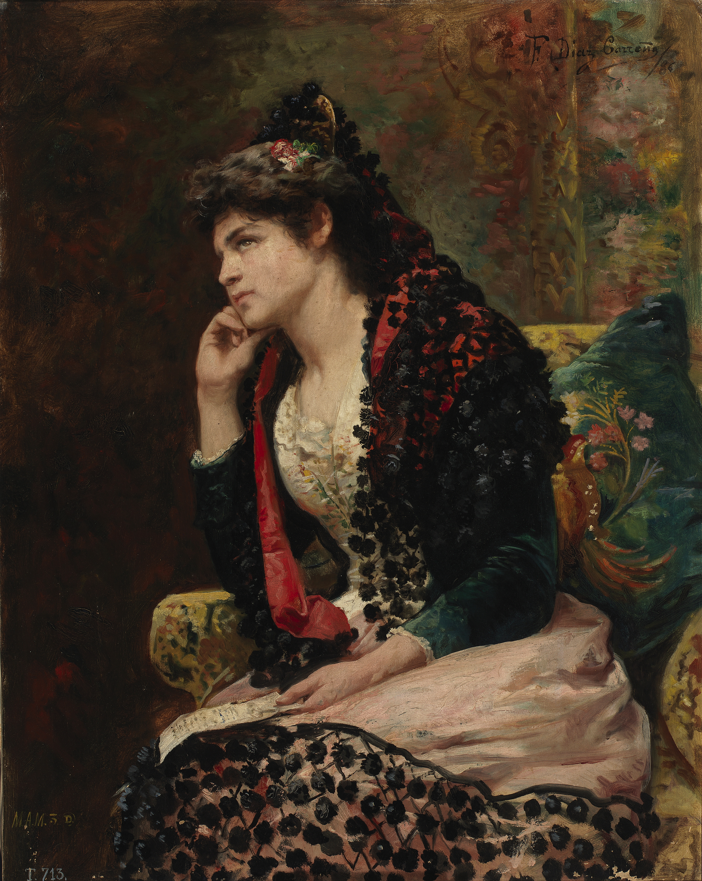 El lienzo, llamado Ausencia, representa a una mujer ausente y pensativa.